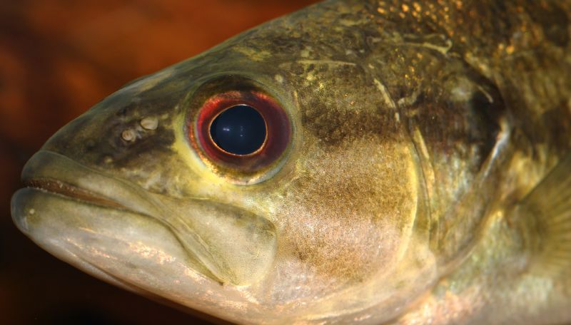 Guadalupe bass (Micropterus treculii)